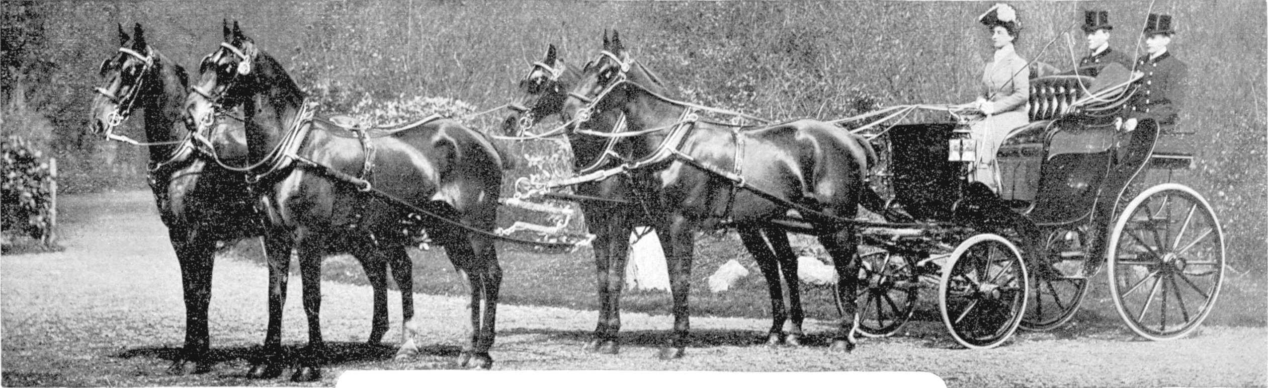 Le FOUR-IN-HAND. L'après-midi, au Bois, dans son équipage merveilleusement attelé, conduit ses quatre chevaux avec une maëstria impeccable.